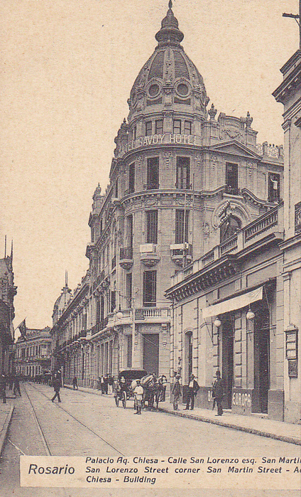 Perspectiva de la calle San Lorenzo en la ciudad argentina de Rosario. Se destaca el entonces nuevo Hotel Savoy. Postal enviada en 1912.